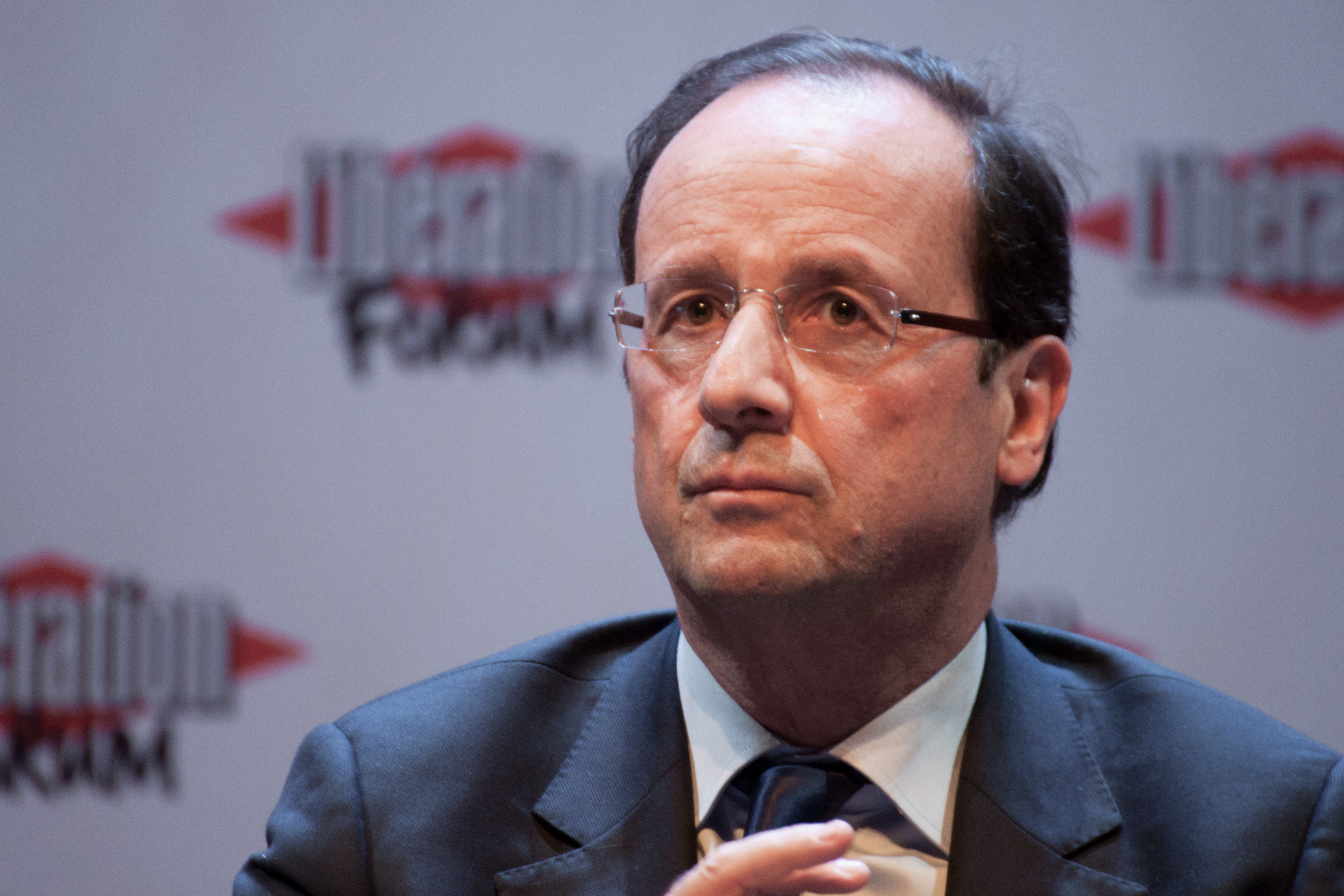 François Hollande au Forum Libération de Grenoble, en janvier 2012